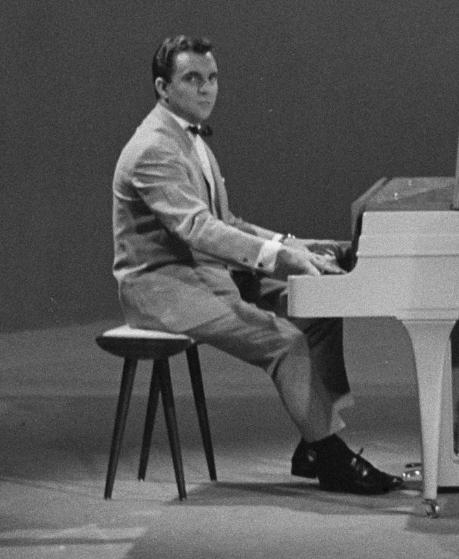 Opname van Hazy Osterwald sextet in Cinetone. Curt Prina.